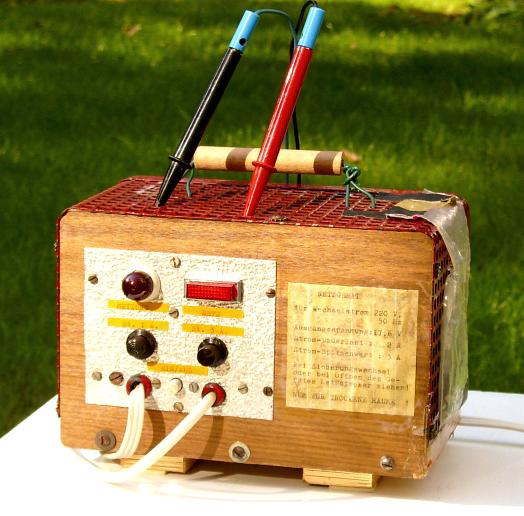 Rähmchen Einlöt Trafo